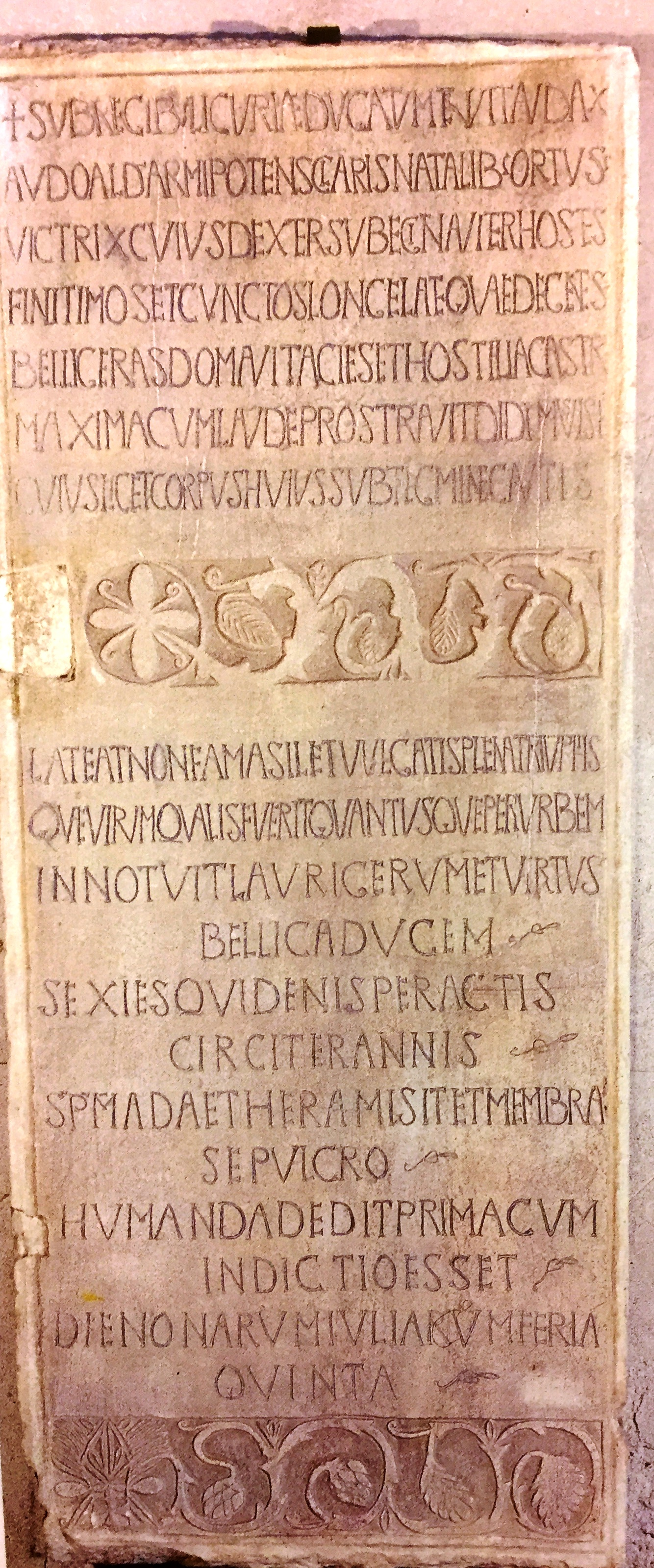 Lastra tombale di Audoaldo